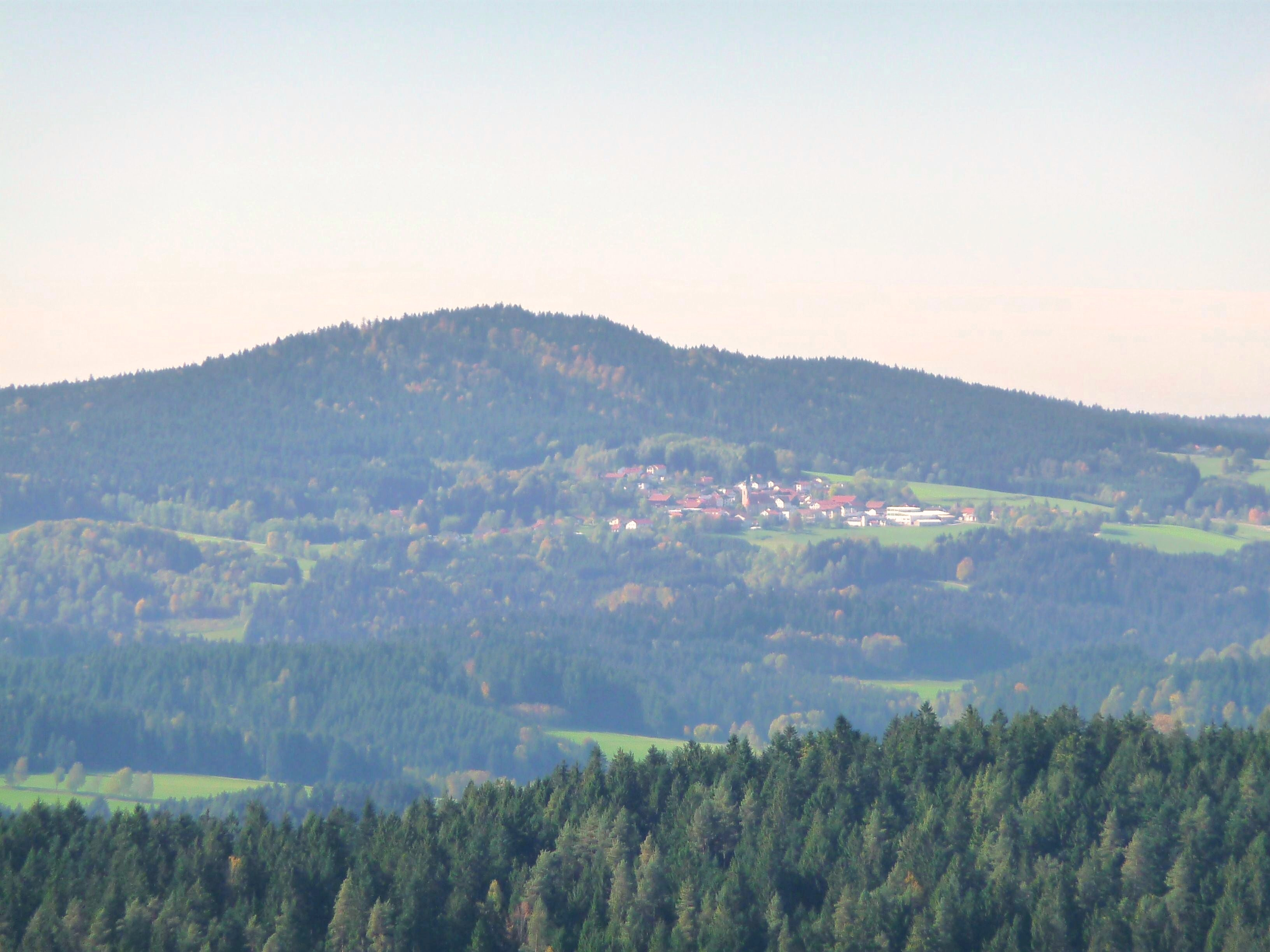 Der Fürberg im Bayerischen Wald mit dem Ort Untermitterdorf vom Aussichtsturm Oberkreuzberg aus